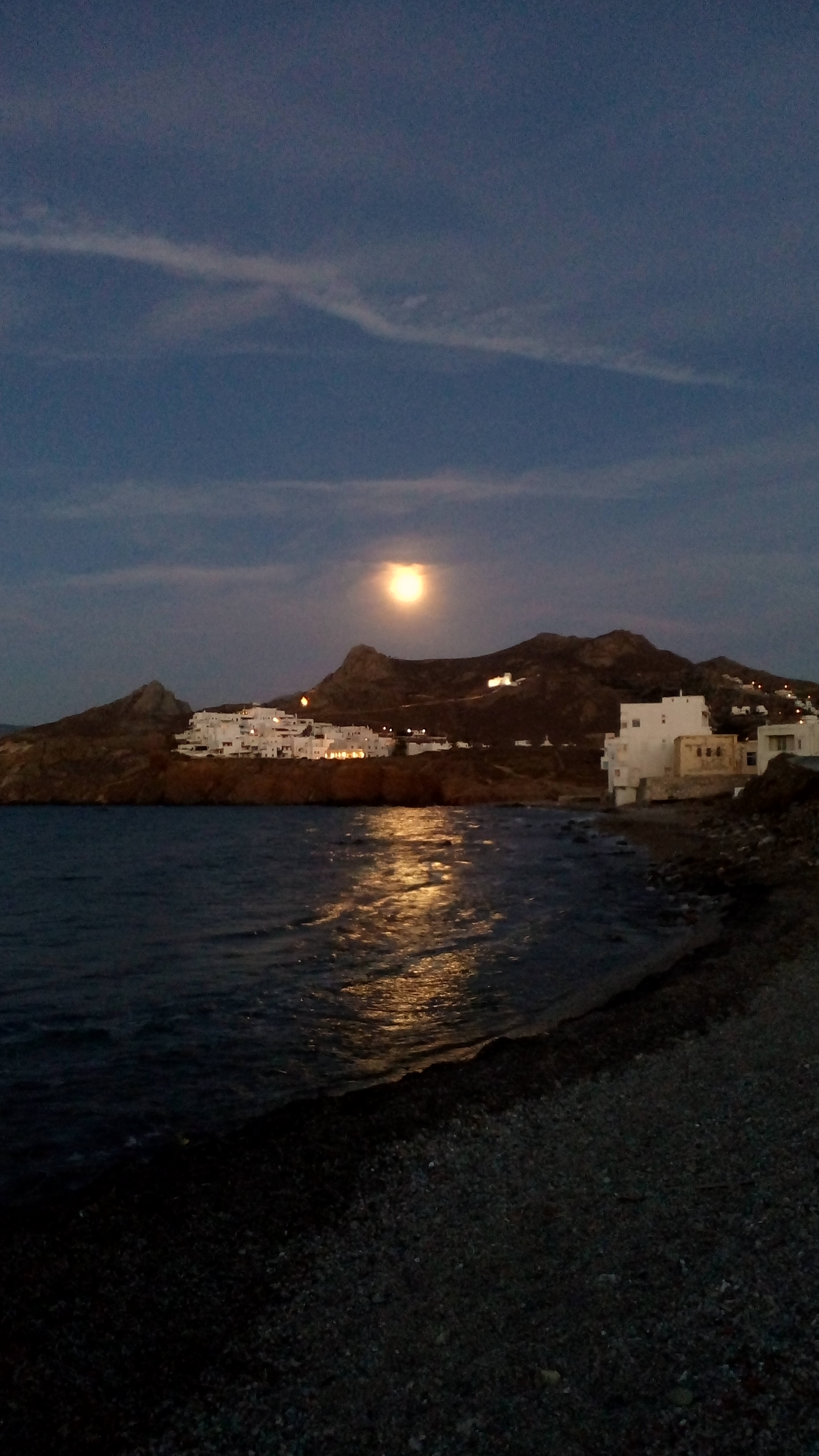 Πανσέληνος,Γρόττα,Χώρα,Νάξου